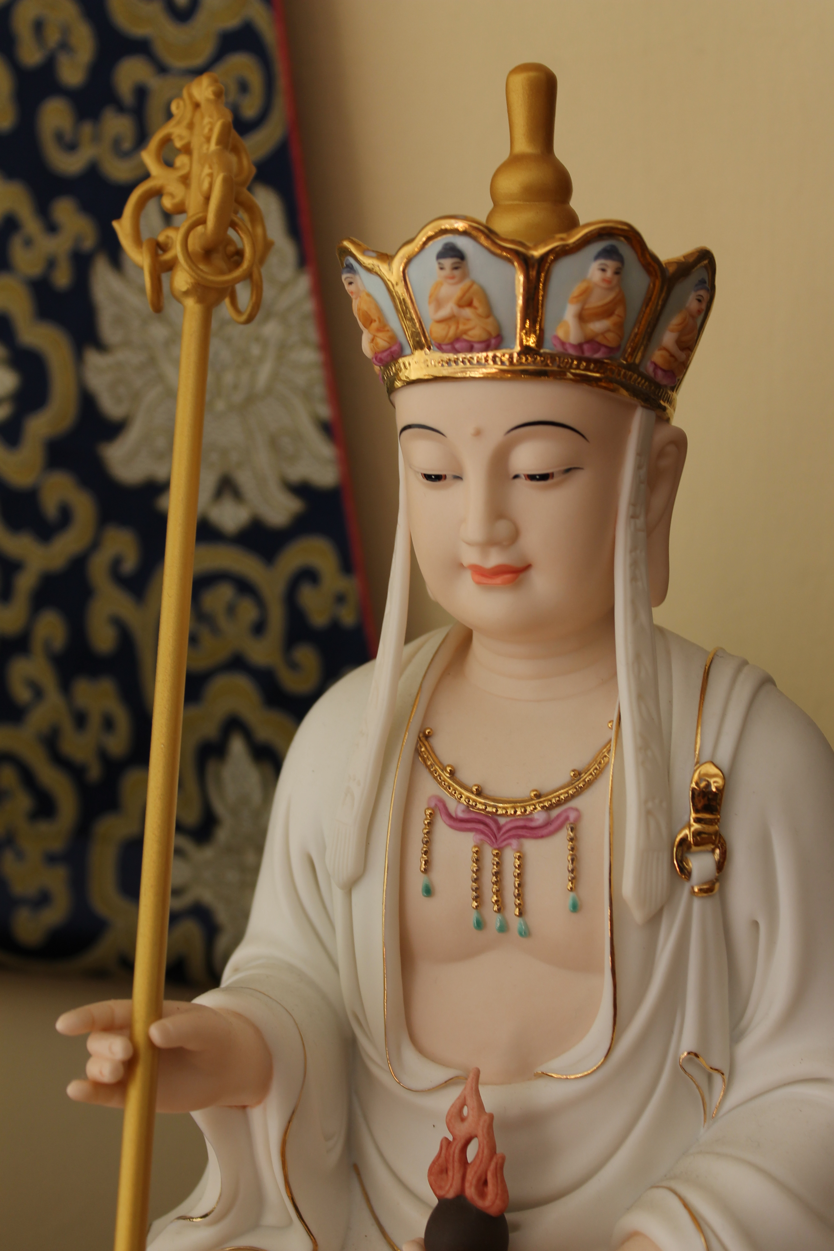 Imagen de Ksitigarbha en el Centro Khamlungpa en la ciudad de Guadalajara, Jalisco, Mexico.